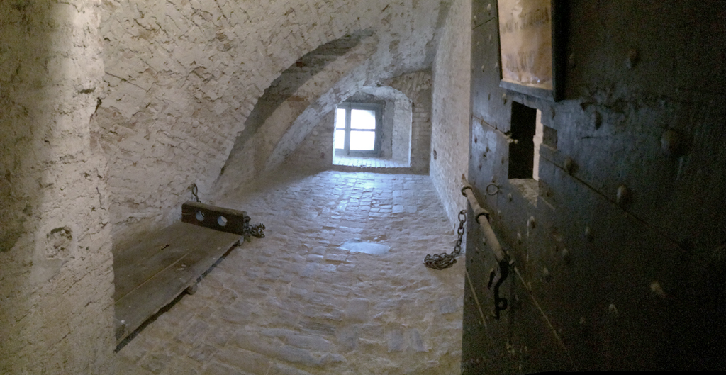 Cella di Andrea Vochieri all'interno del Palazzo del Governatore (poi Caserma Beleno)